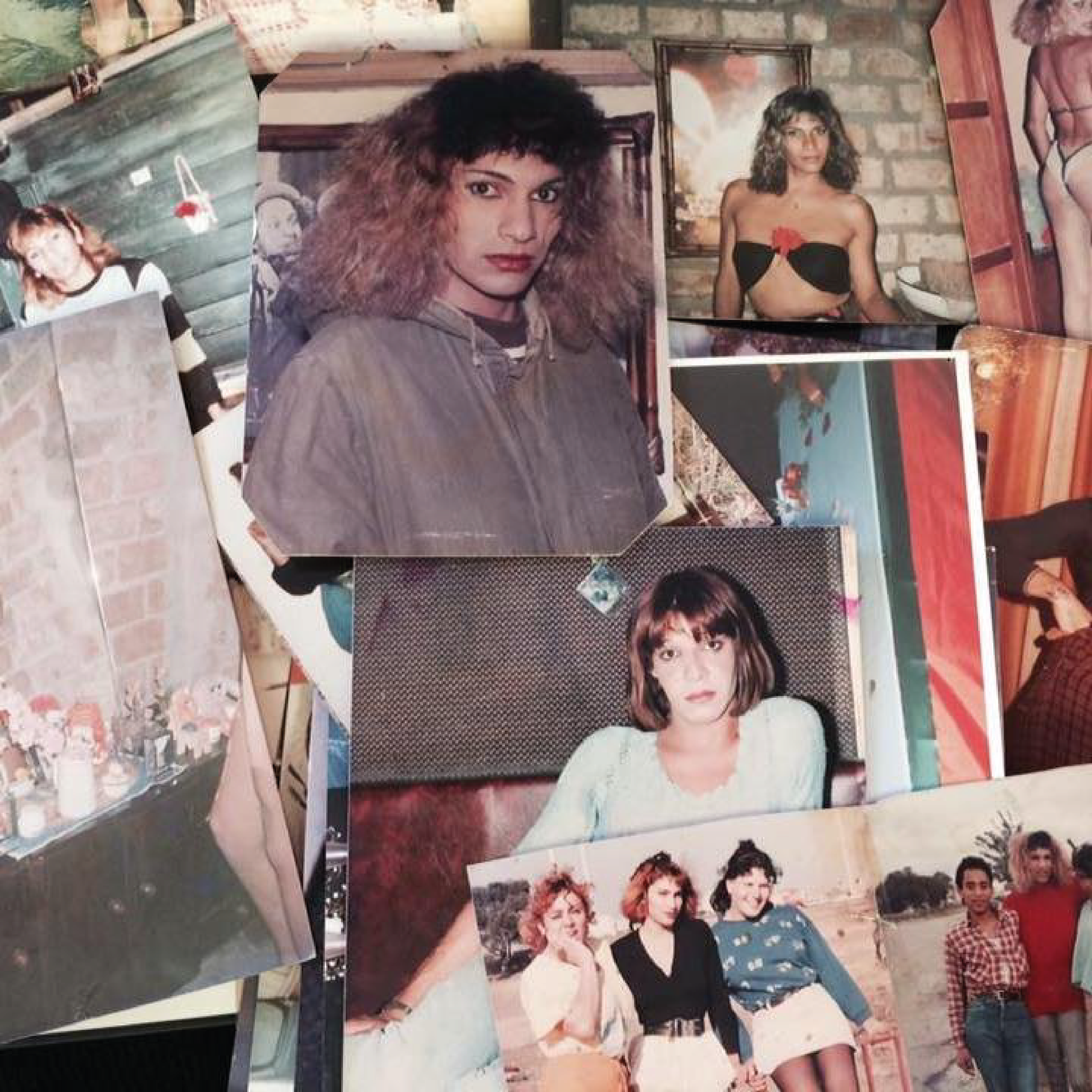 Imagen de portada del Archivo de la memoria trans en Argentina